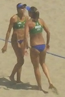 Dupla Lili-Carol durante os Jogos Pan Americanos de 2015.